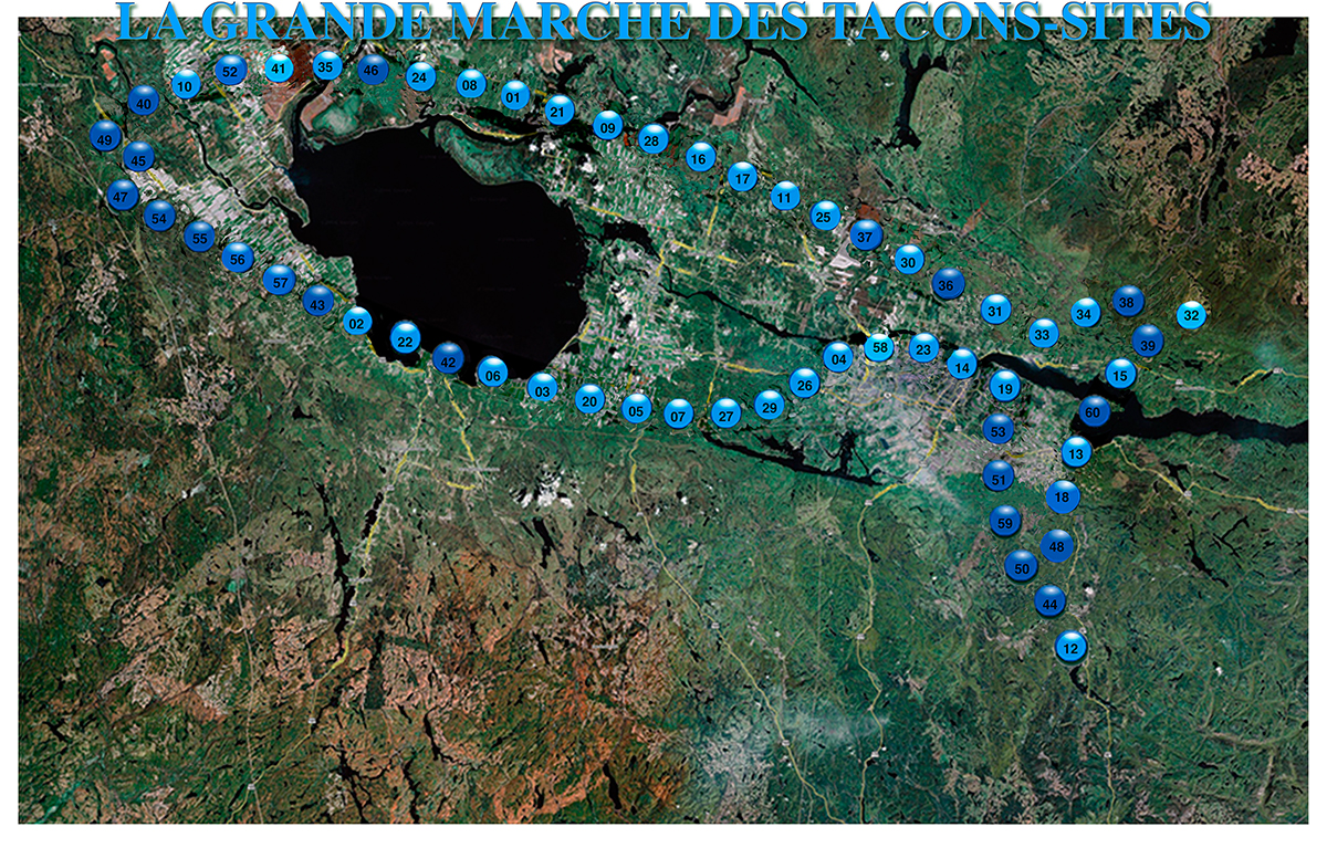 Superposition sur une image satellite du territoire Saguenay—Lac-Saint-Jean (Québec, Canada) des 60 sites où sont installés les Tacons-Sites réalisés par Interaction Qui.